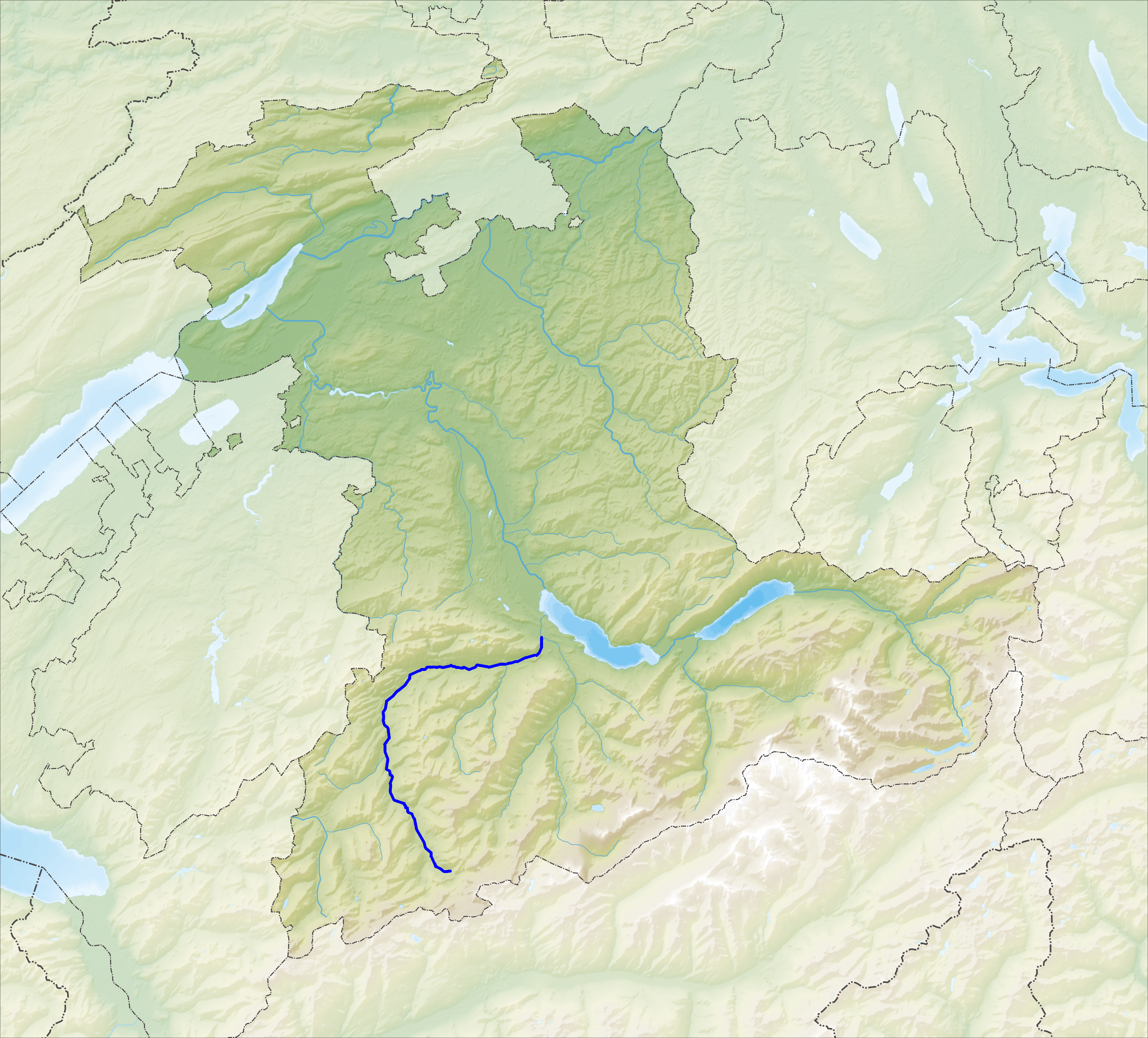 Loop van de rivier Simme, kanton Bern, Zwitserland